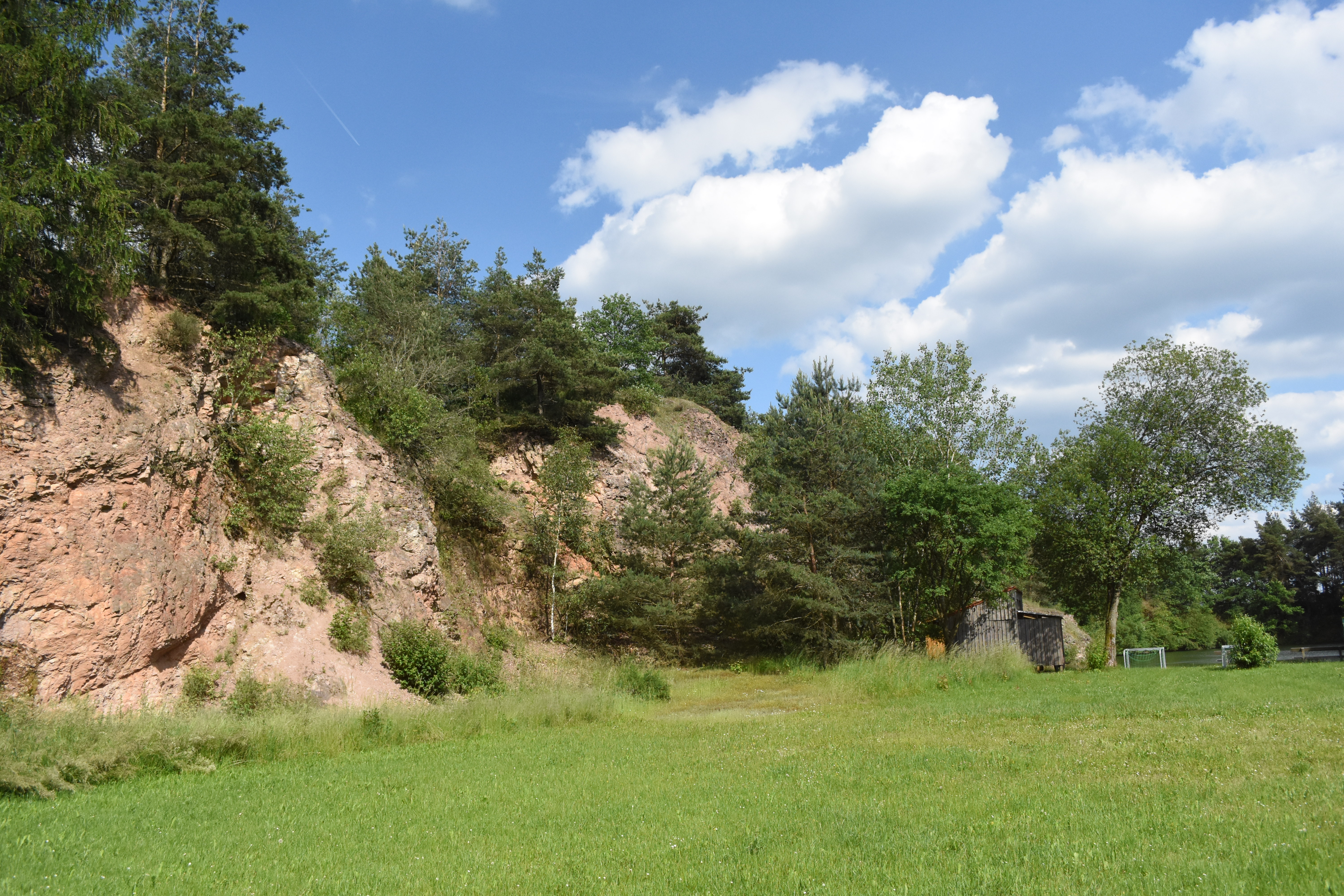 Pingartener Porphyr in der Oberpfalz bei Bodenwöhr - ein ehemaliger Steinbruch